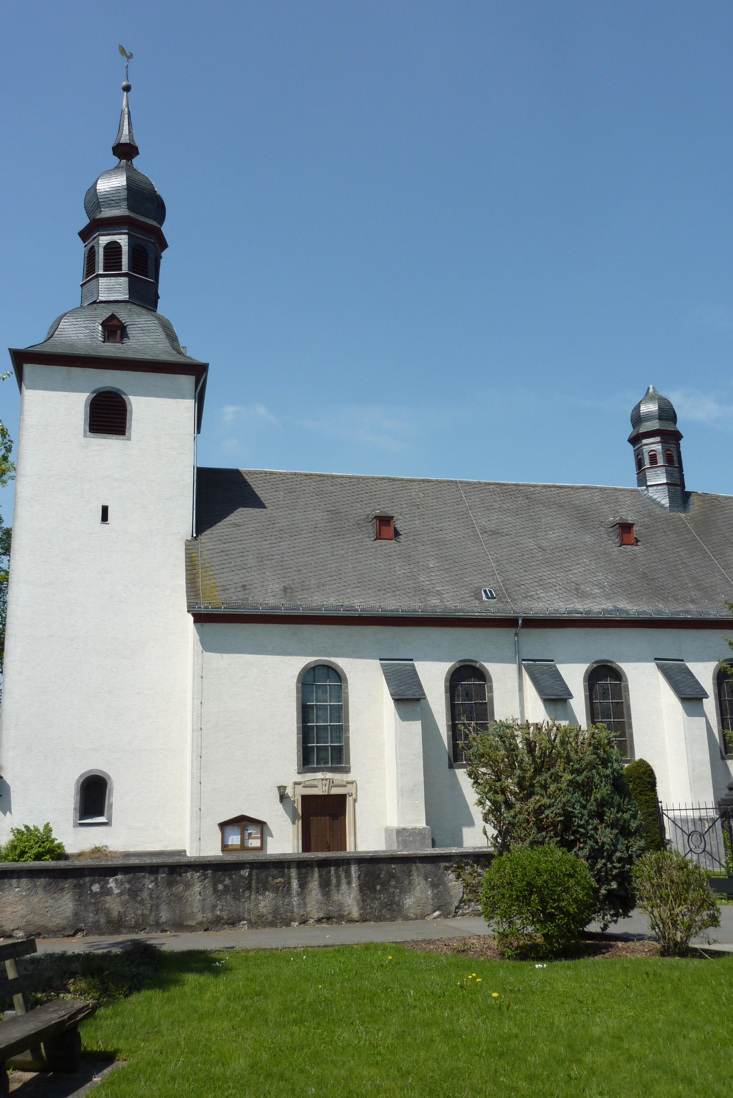 Pfarrkirche St. Kastor in Weiler (bei Mayen), Außenaufnahme